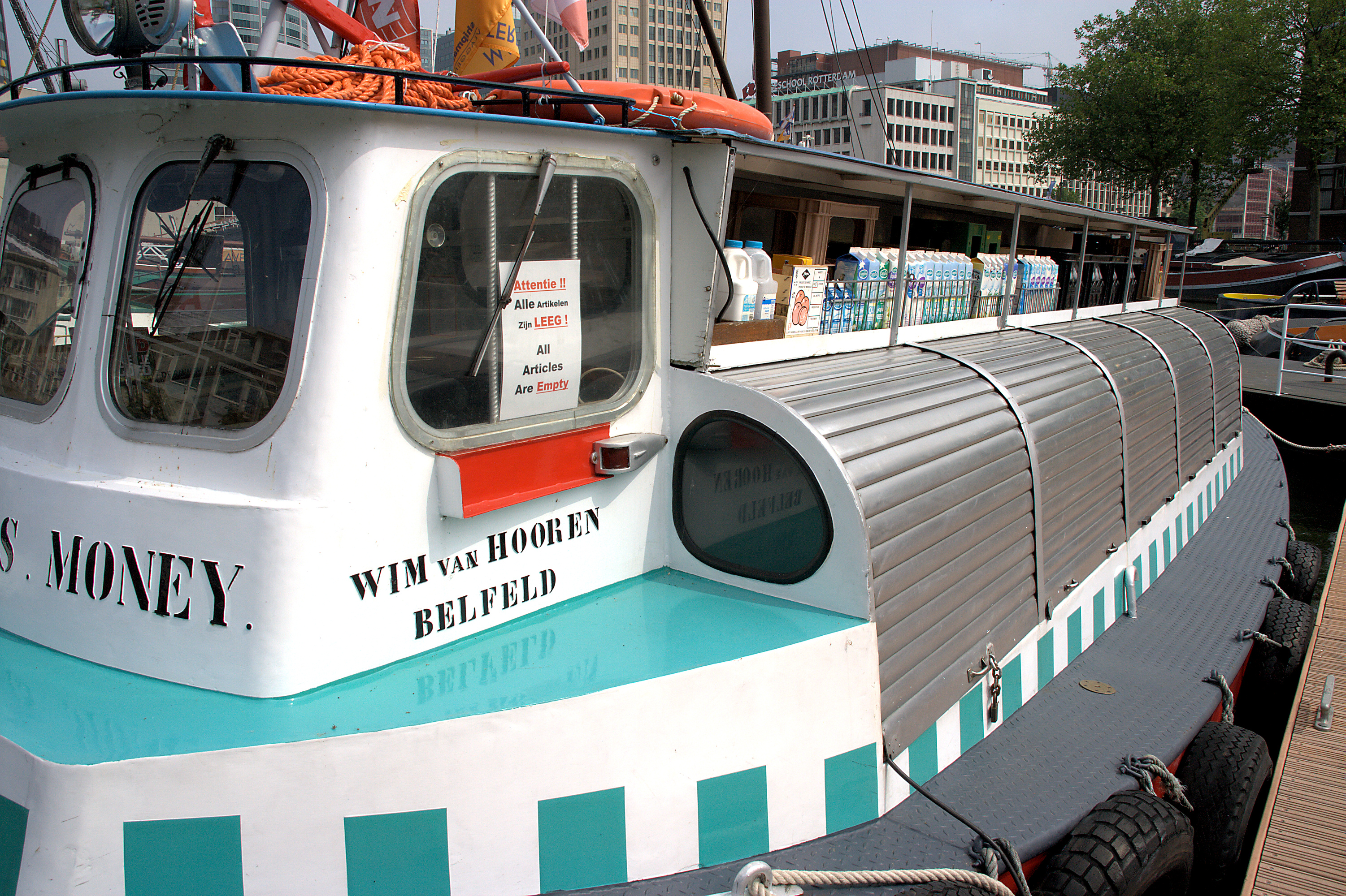 Time is Money (nieuwe parlevinker) Havenmuseum - Parlevinker Time is Money